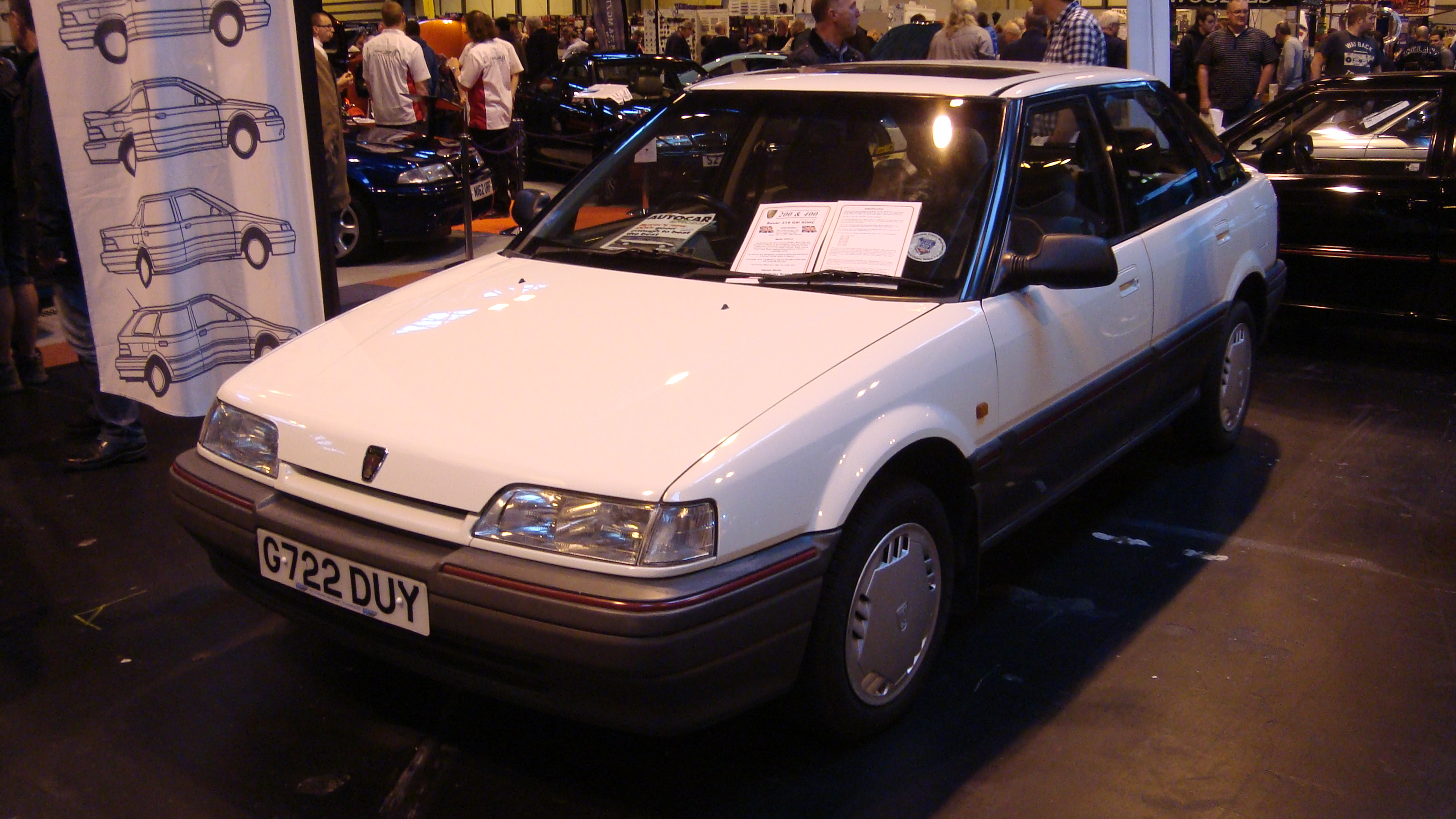 1989 Rover 216 GSi